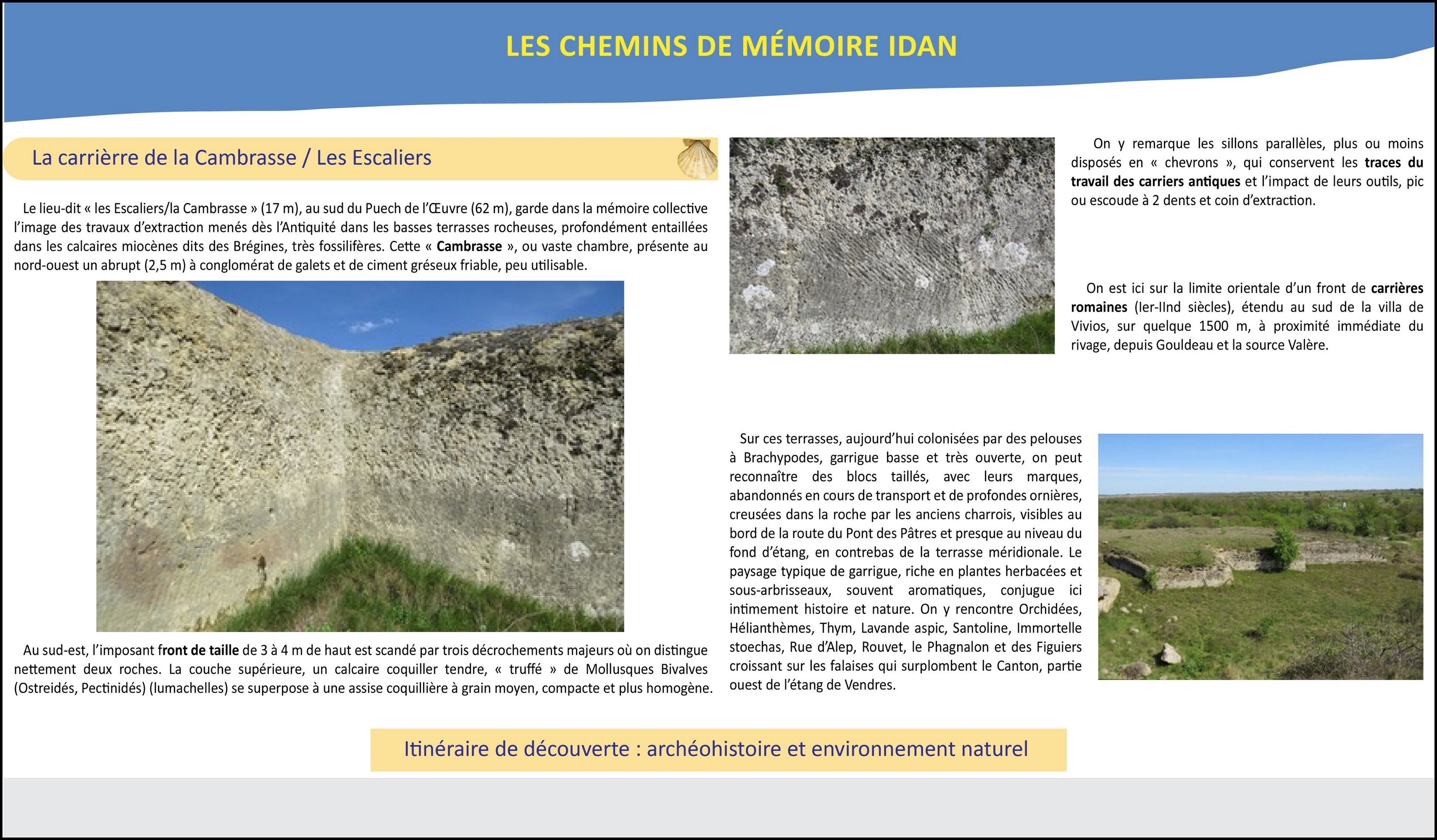 Lespignan (Occitanie : Hérault) : carrière de La Cambrasse- Les Escaliers. Fronts de taille avec les traces d'outils de carriers antiques.